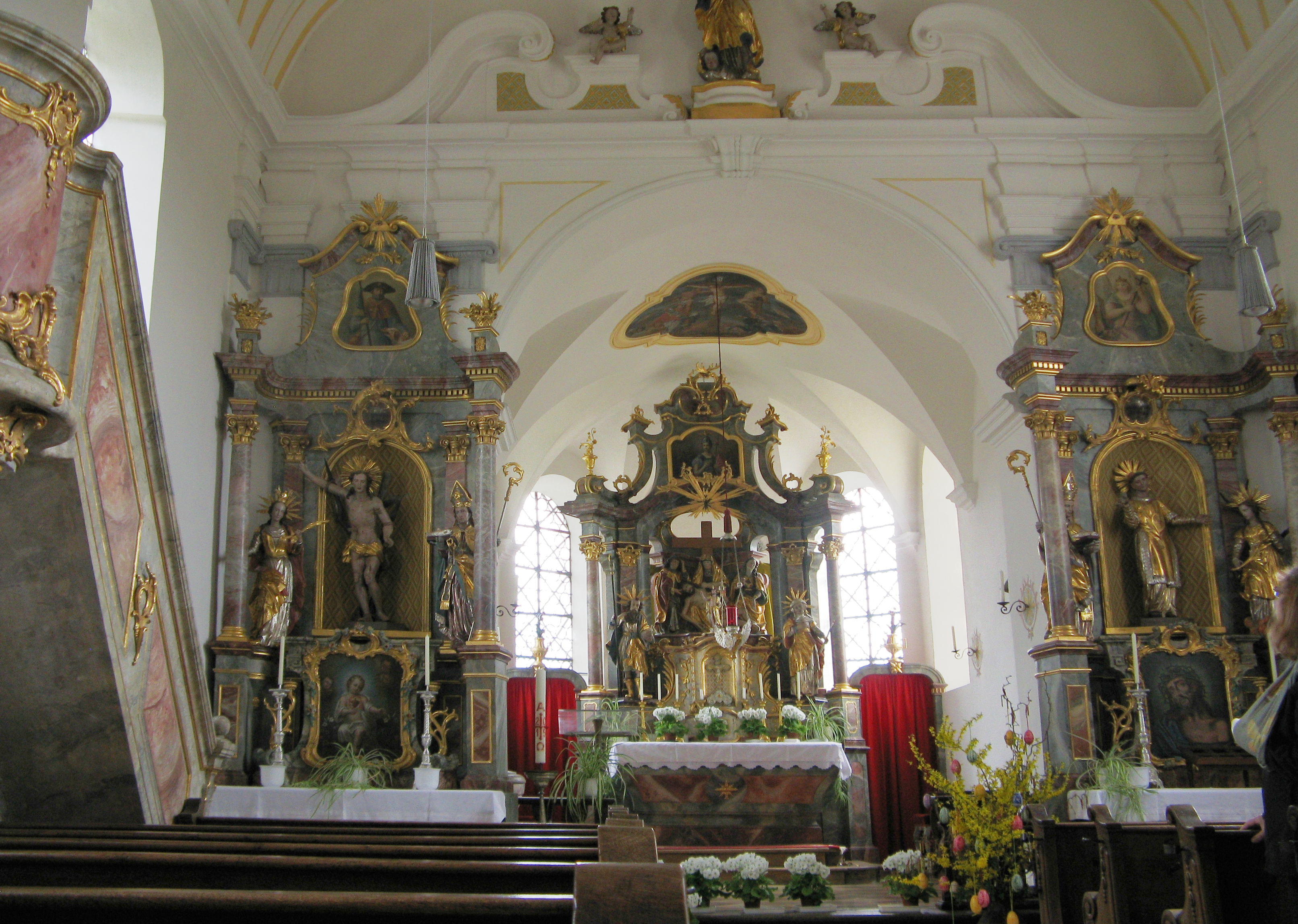 Kirche Jenhausen bei Seeshaupt, Blick zum Hochaltar.